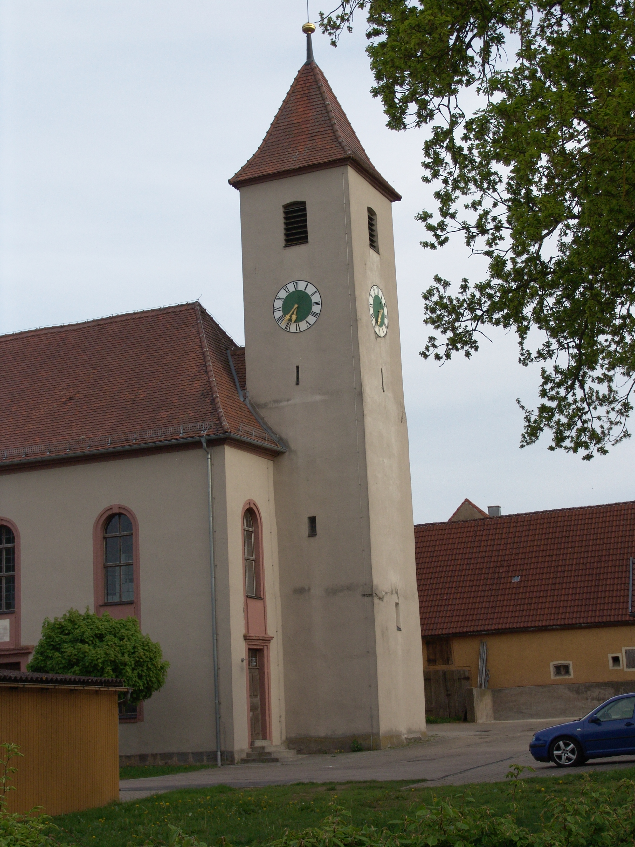 evang.-luth. Kirche St. Leonhard in Untermichelbach